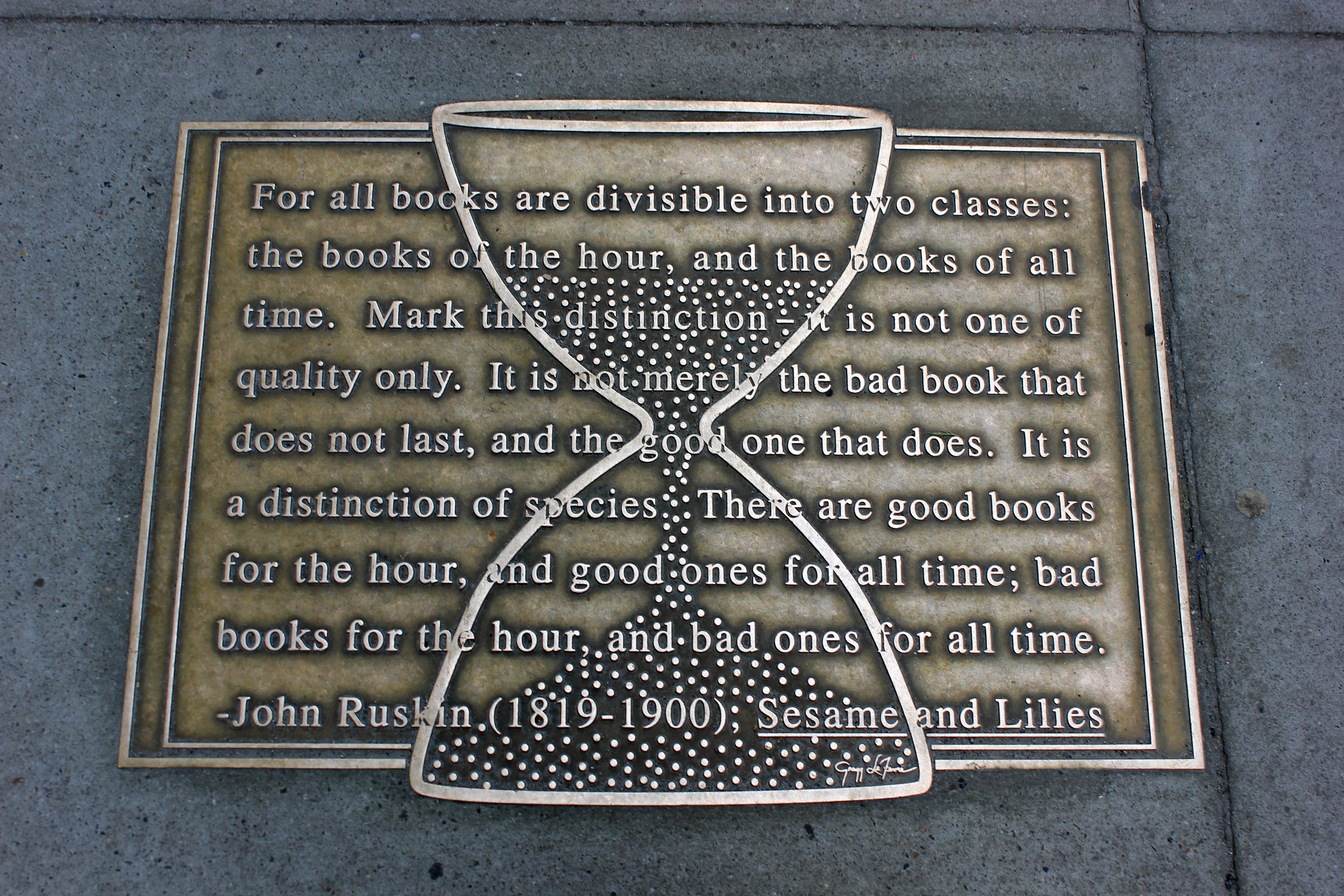 Library Walk New York City